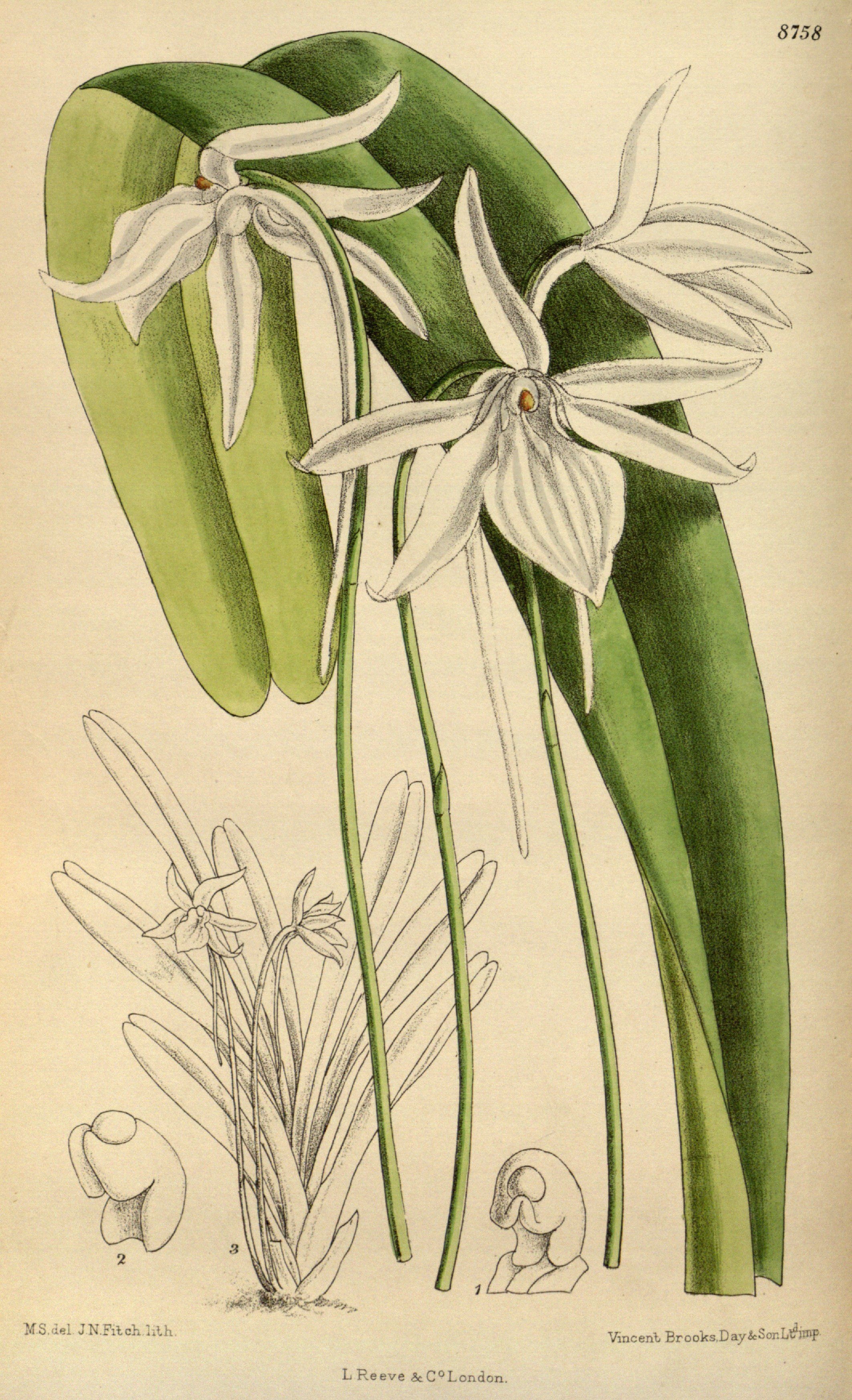 Angraecum gracilipes (= Jumellea sagittata), Orchidaceae